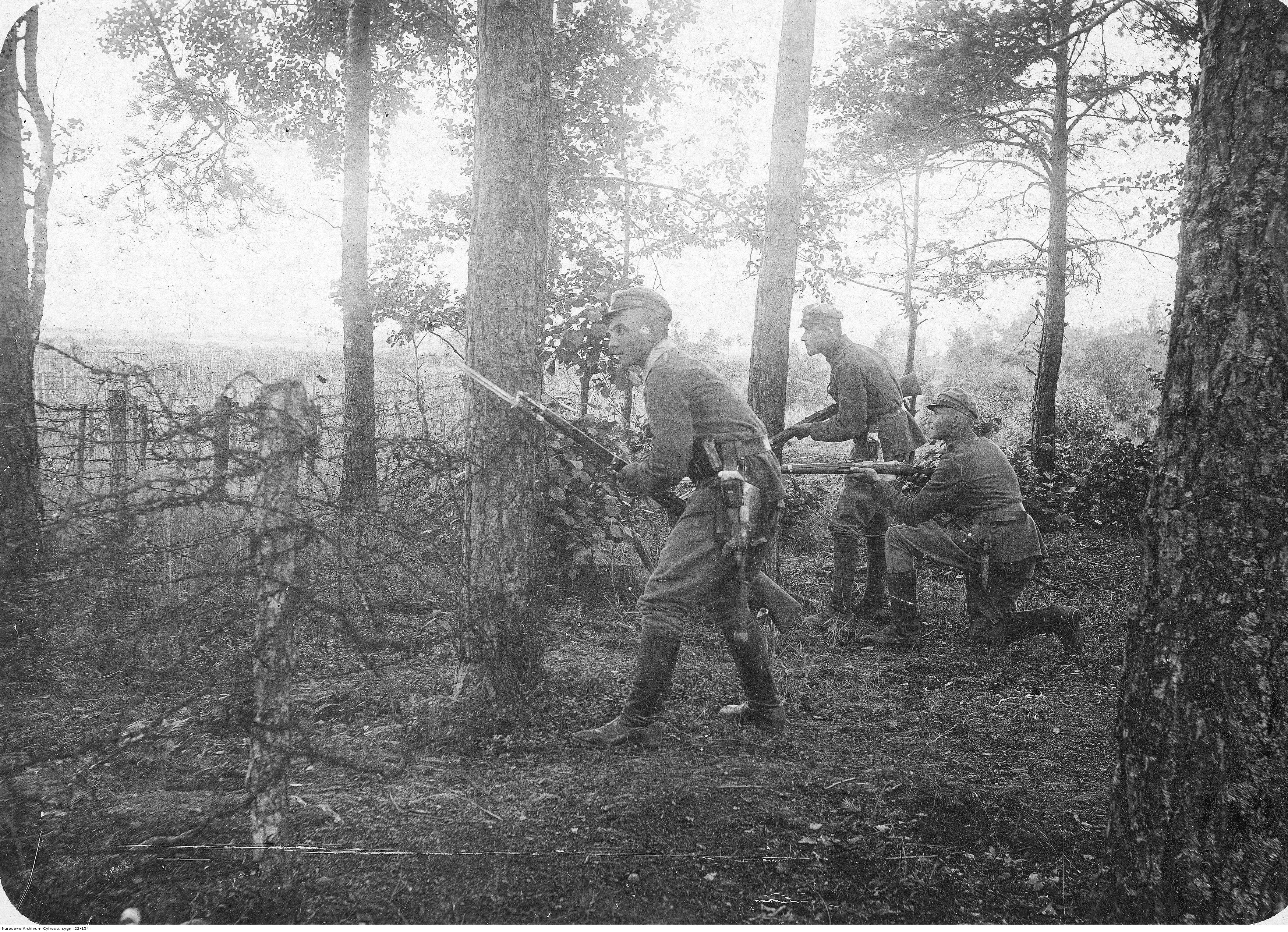 Patrol 3 batalionu I pułku piechoty Legionów w Rudce Sitowieckiej.